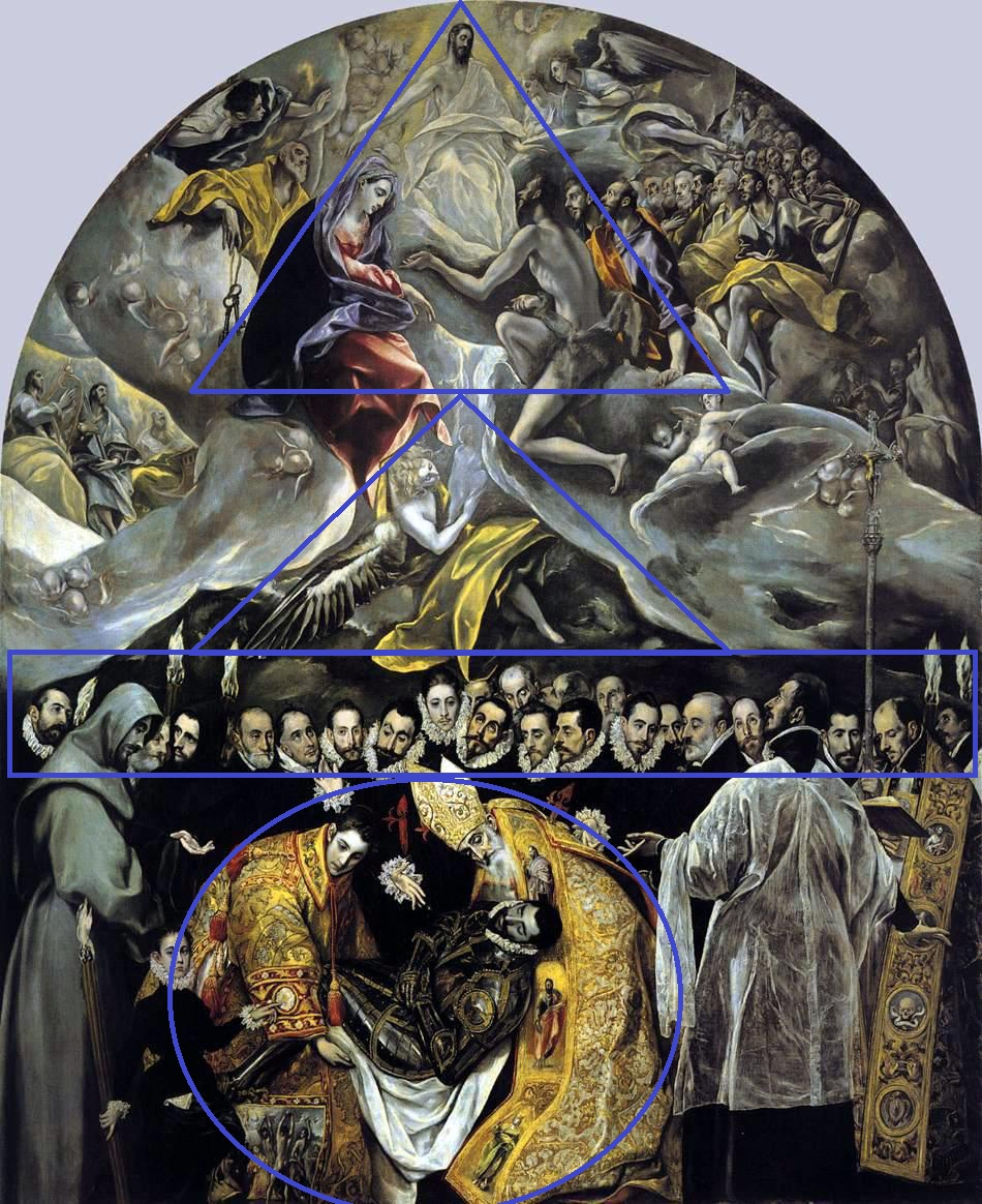 Description Líneas de composición de la pintura El entierro del Conde Orgaz del Greco de la iglesia de Santo Tomé de Toledo Datebetween 1586 and 1588SourceAndreagrossmannAuthor El Greco (1541–1614) Alternative namesbirth name: Domenikos Theotokópoulos